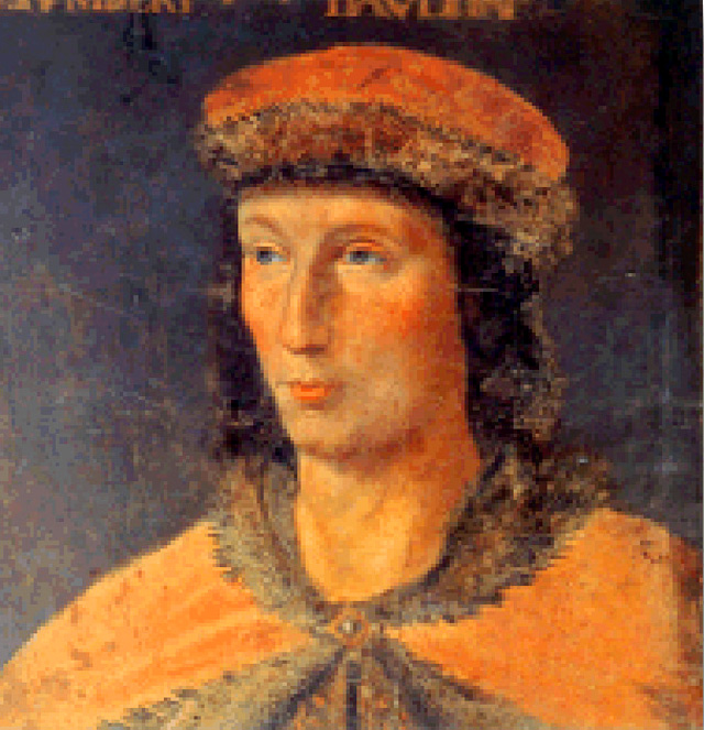 Portrait du Dauphin Humbert II de Viennois jeune